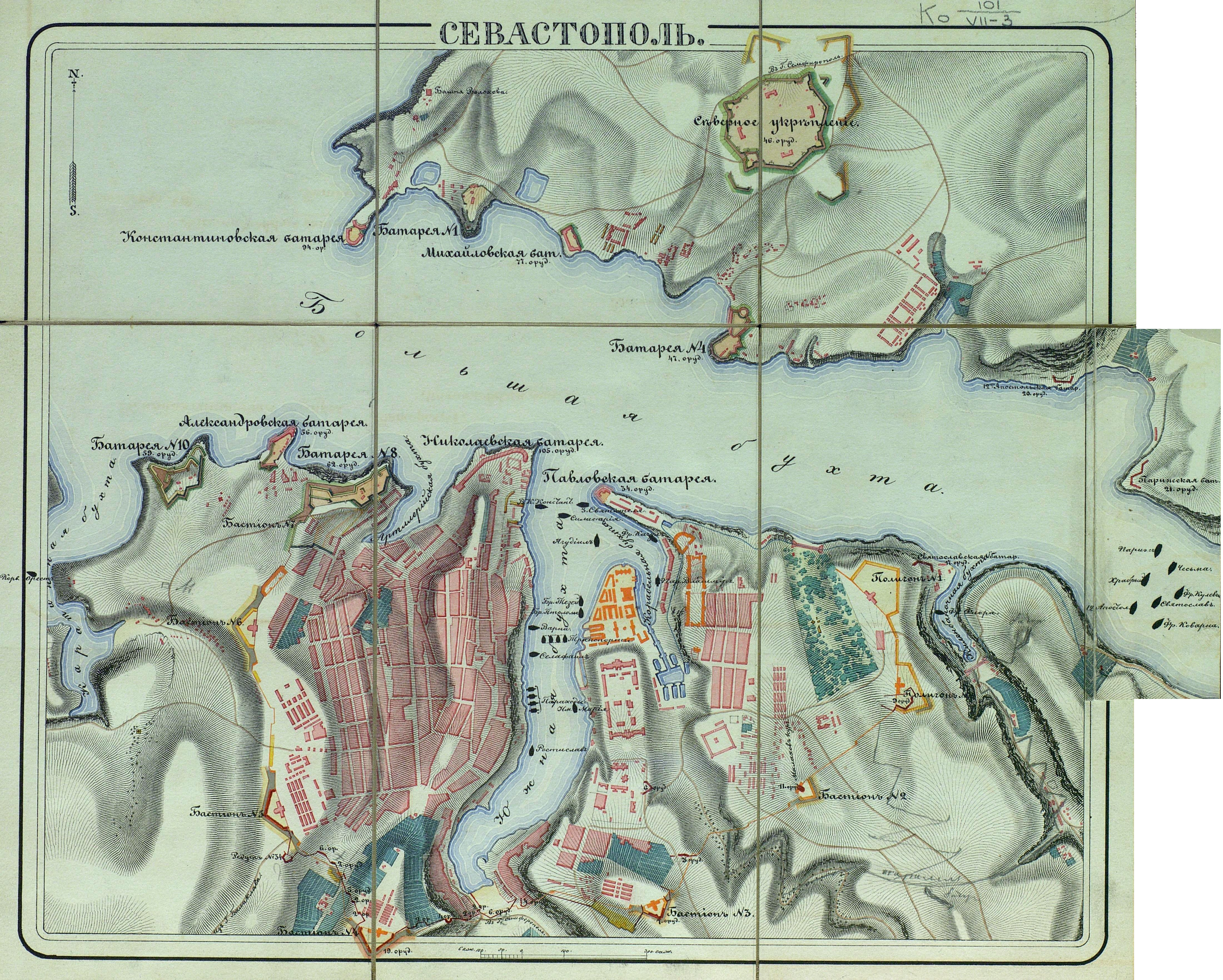 Cевастополь.